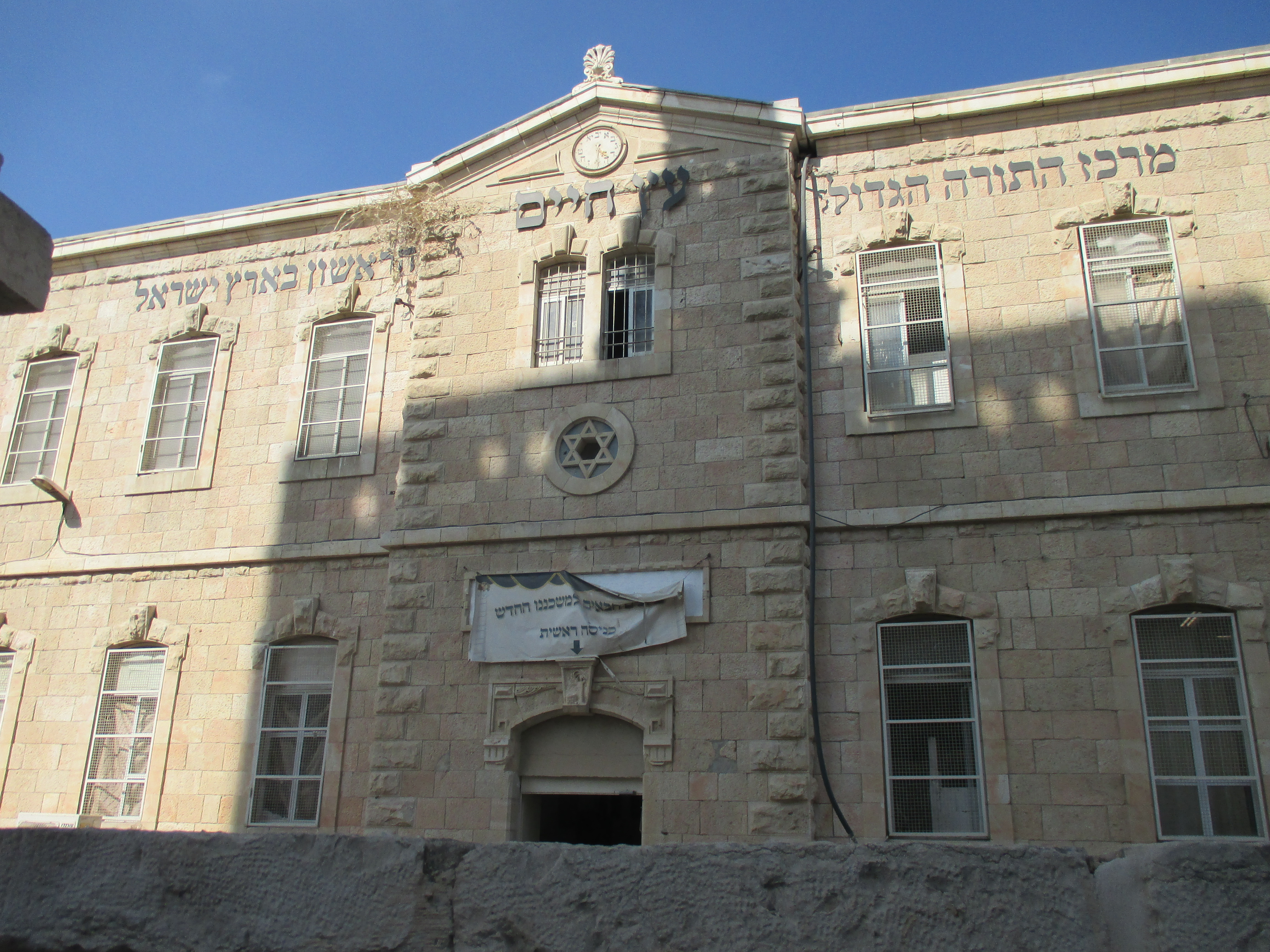 בית הספר למל הפך לתלמוד תורה עץ חיים